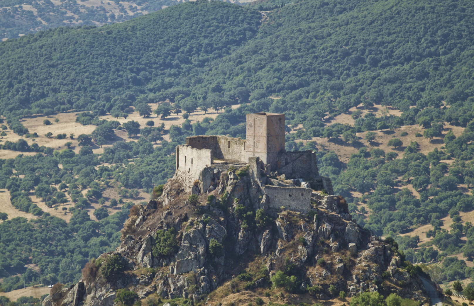 Castello di Burgos, Burgos, Sassari, Sardinia, Italy